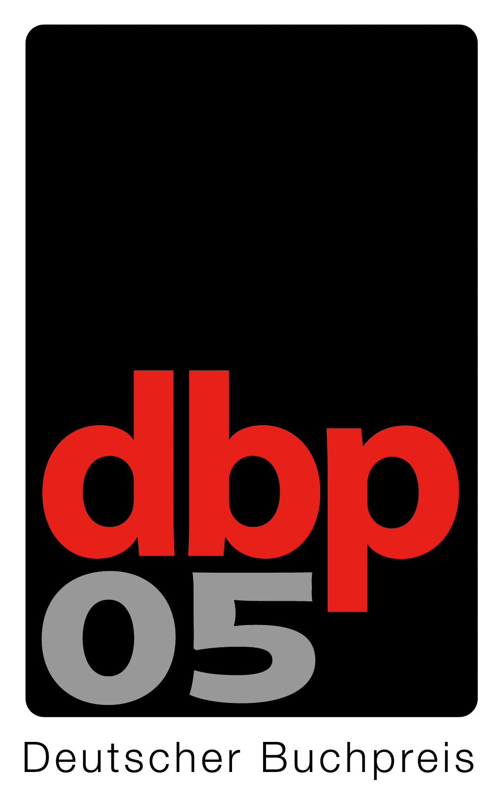 Logo Deutscher Buchpreis 2005